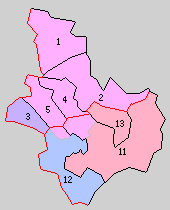 後の鹿児島県曽於郡域の町村制時点の町村。